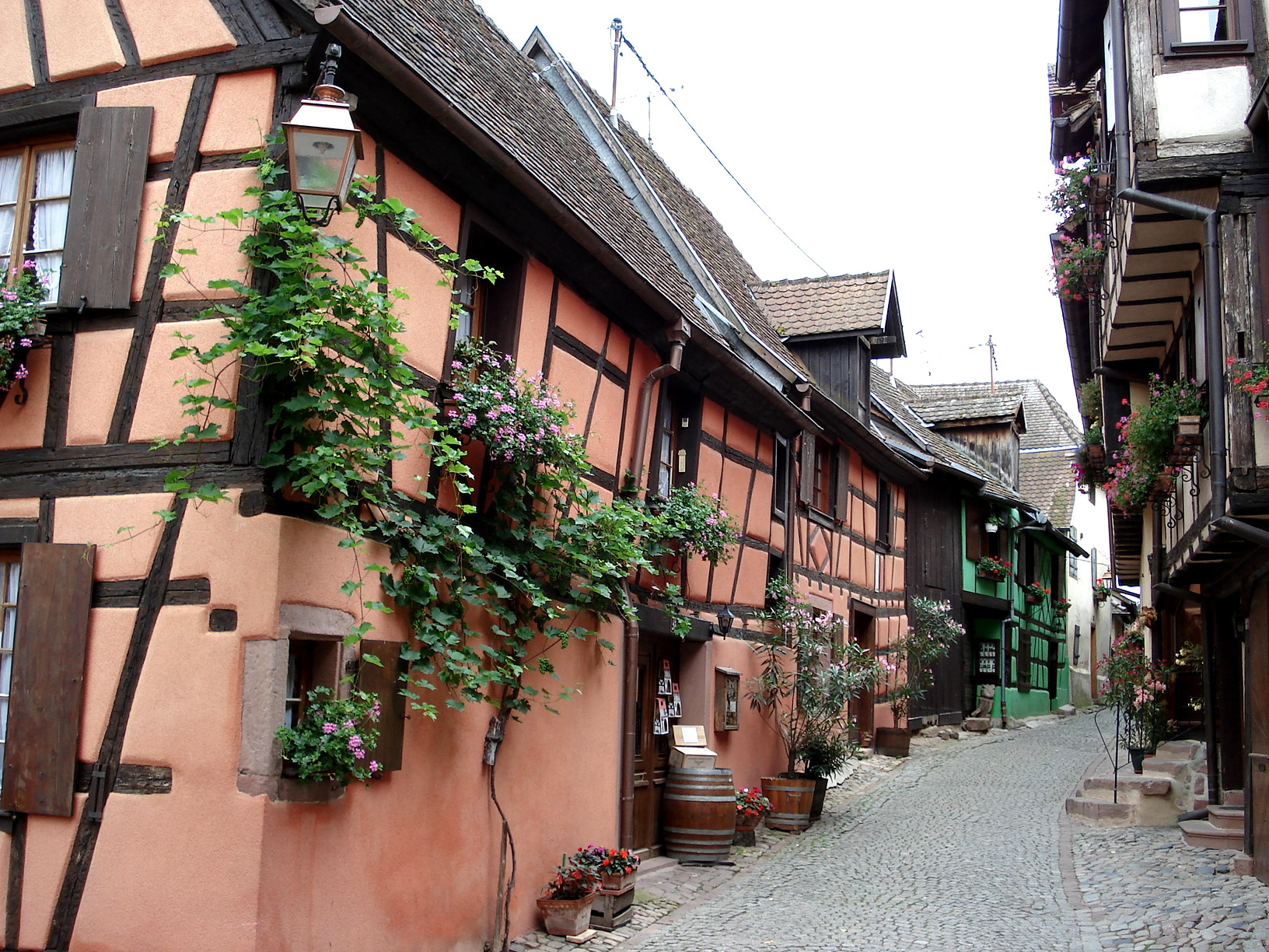 Riquewihr (Haut-Rhin, France): rue des Remparts, à l'extrémité ouest de la ville.